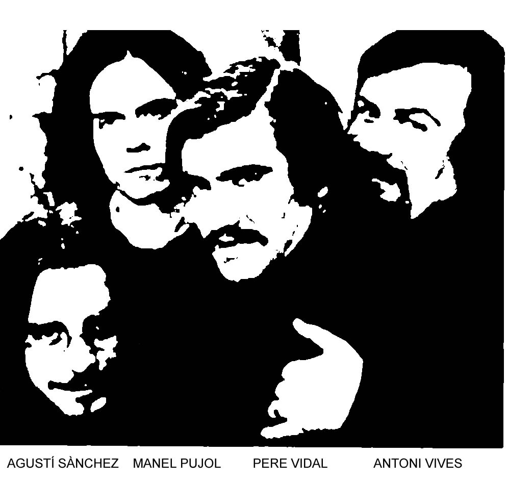 Components del grup ARRELS